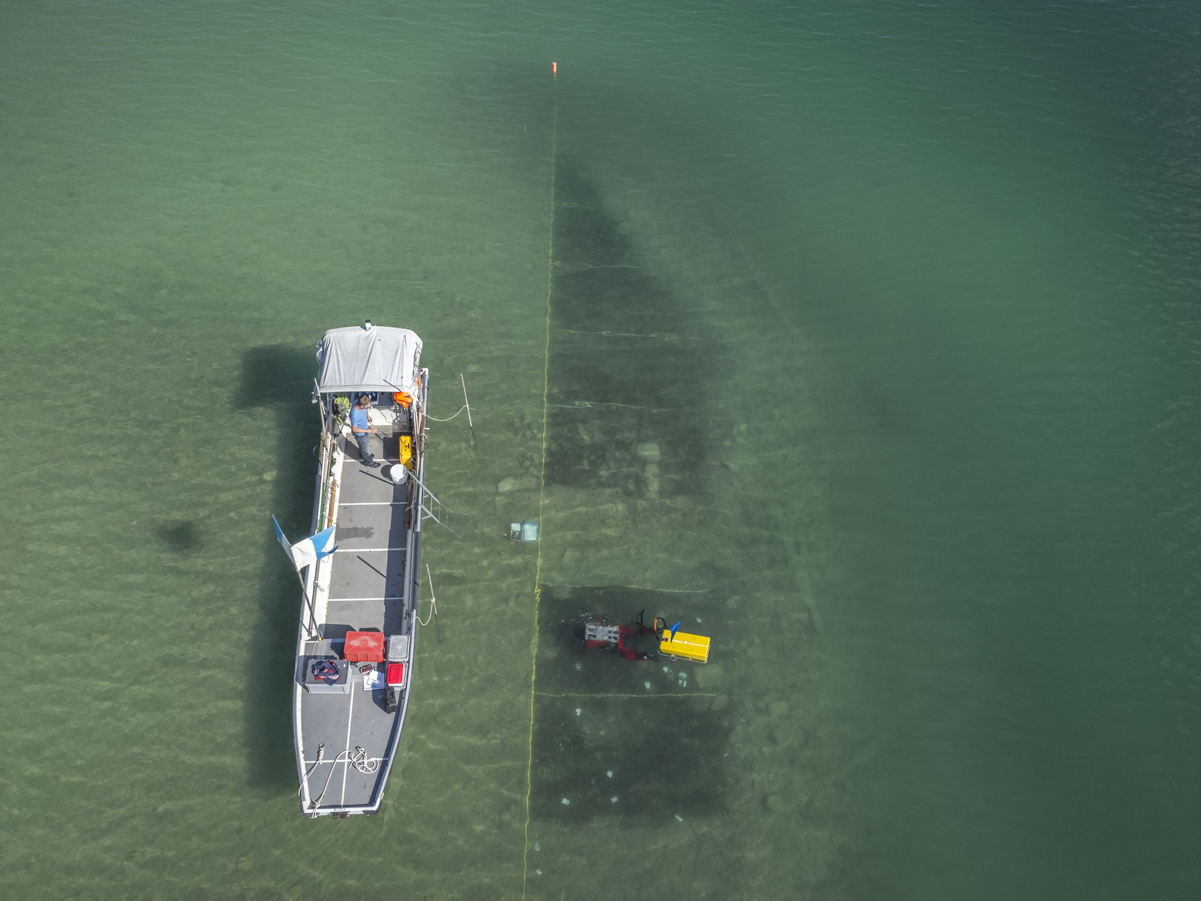 Bildarchiv der Kantonsarchäologie Aargau Objekt: Seeufersiedlung (Pfahlbauerdorf) Ort: Beinwil am See, Ägelmoos Aufnahmedatum: 30.08.2017 Beschreibung: Taucheinsatz der Stadtarchäologie Zürich (UWAD) bei der Oberflächenaufnahme. Oberflächendokumentation des stark gefährdeten Haldenbereichs. Es wurde in 2 m breiten Sektoren gearbeitet. Bei der Oberlächenaufnahme wurden Funde geborgen, Holzproben für die Jahrringdatierung der Pfähle entnommen und das Terrain für die geplanten Schutzmassnahmen vorbereitet.